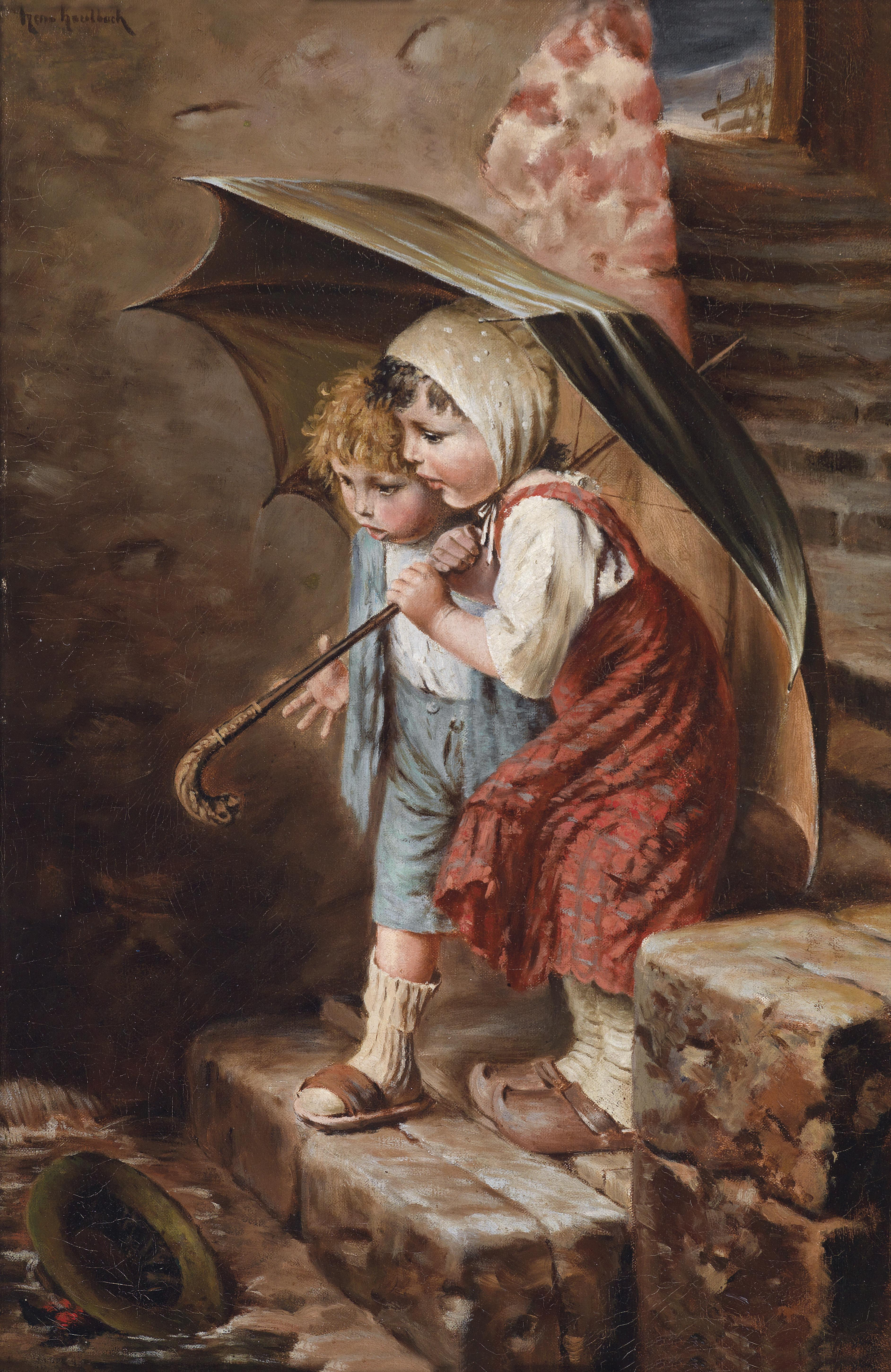 Die Überraschung, signiert Herm. Kaulbach, Öl auf Leinwand, 47 x 31 cm